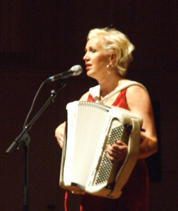 Merja Larivaara